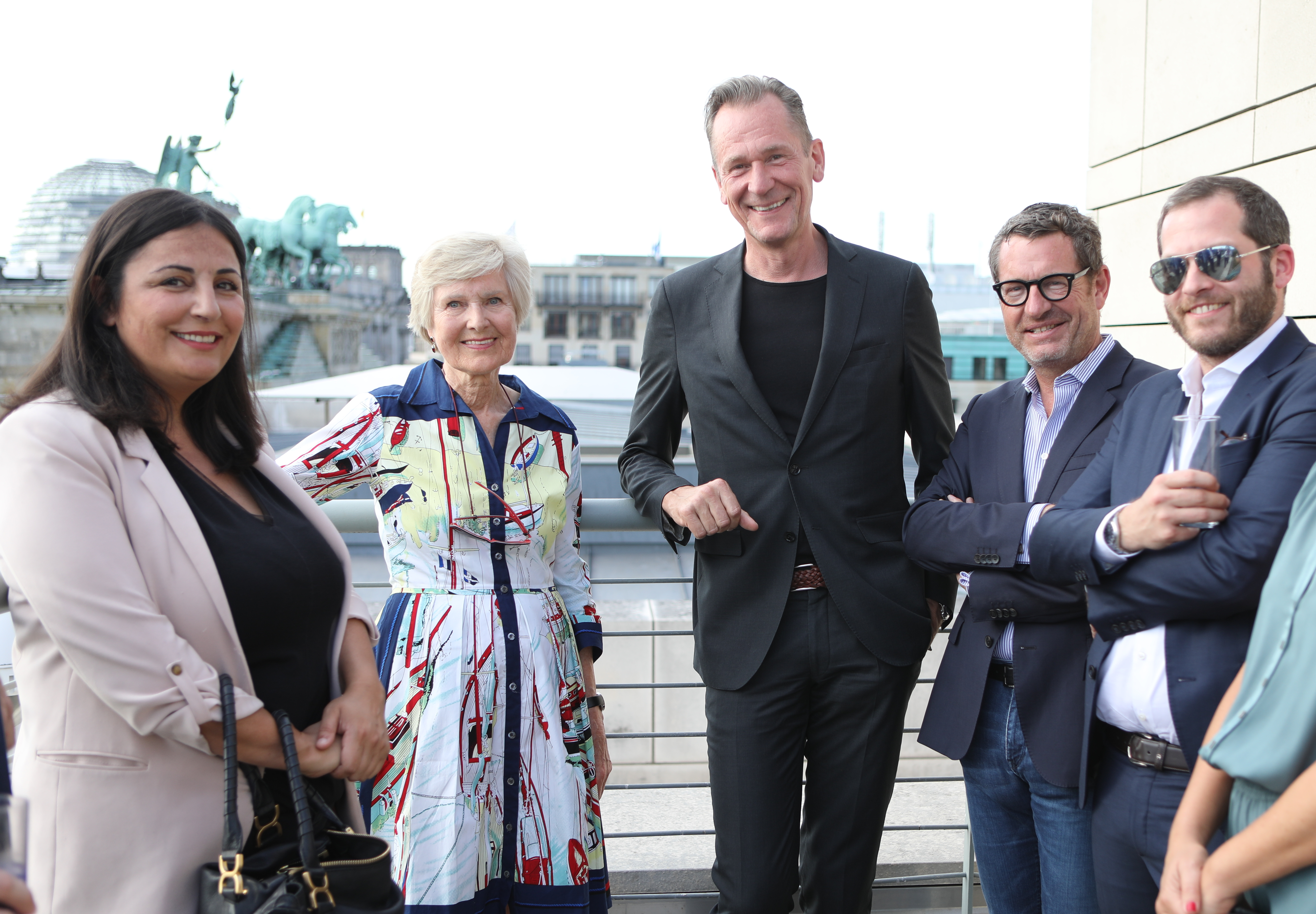 L to R: Düzen Tekkal, Friede Springer, Mathias Döpfner, Kai Diekmann, and Julian Reichelt, June 2019